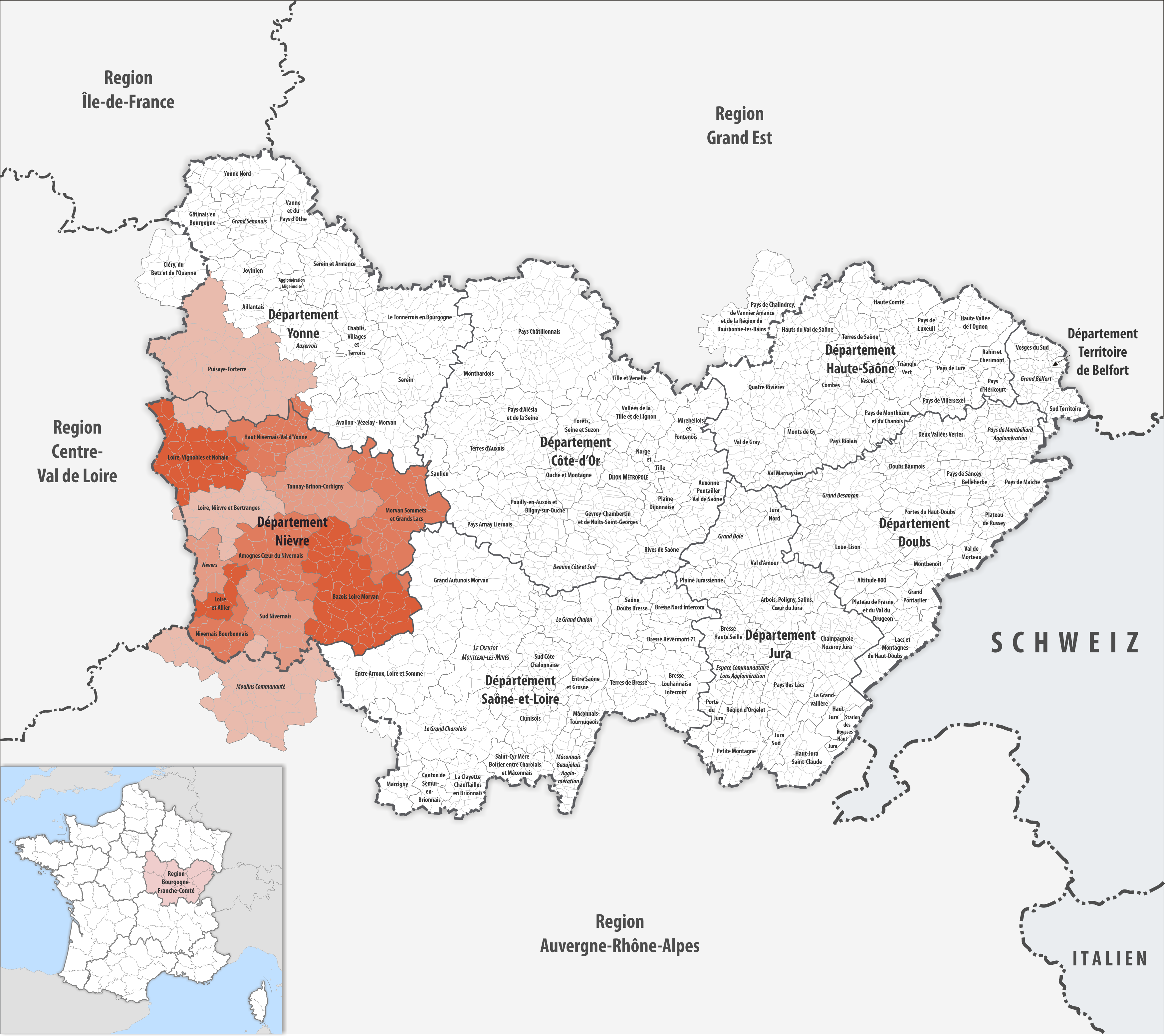 Gemeindeverbände im Département Nièvre